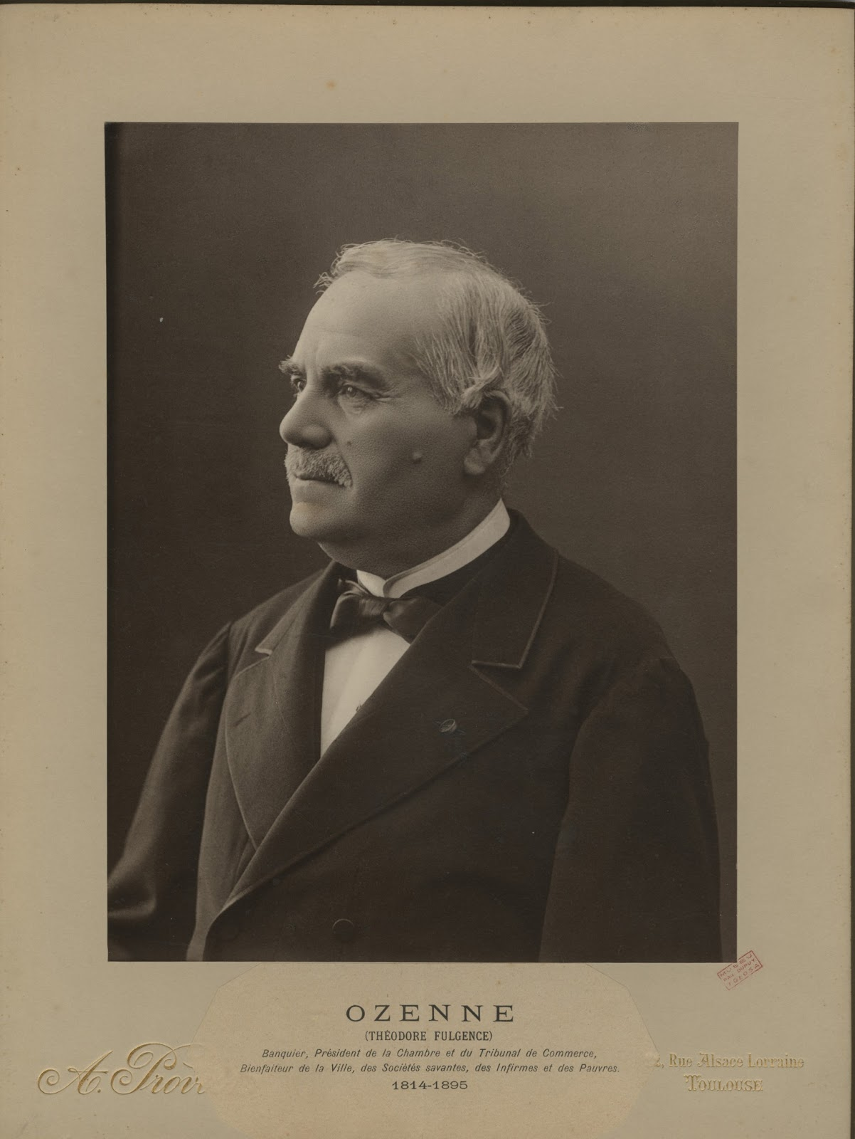 Portrait du banquier Théodore Fulgence Ozenne (1814-1895)